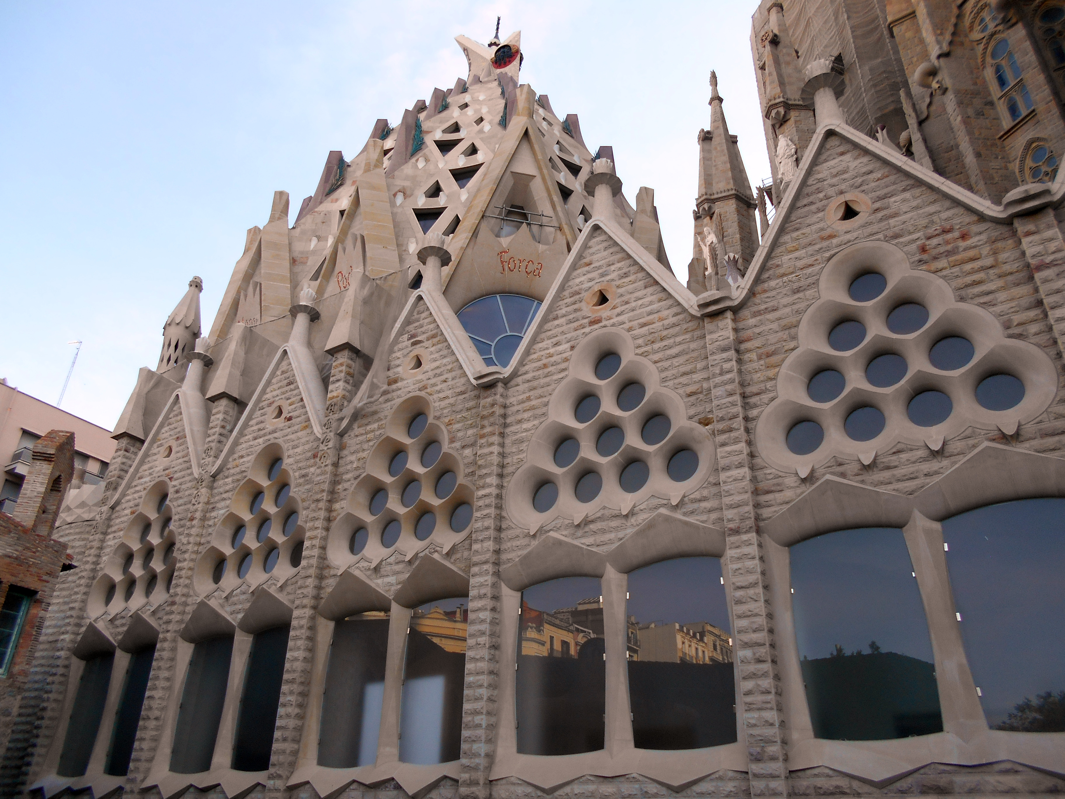 Exterior del claustro de la Sagrada Familia.